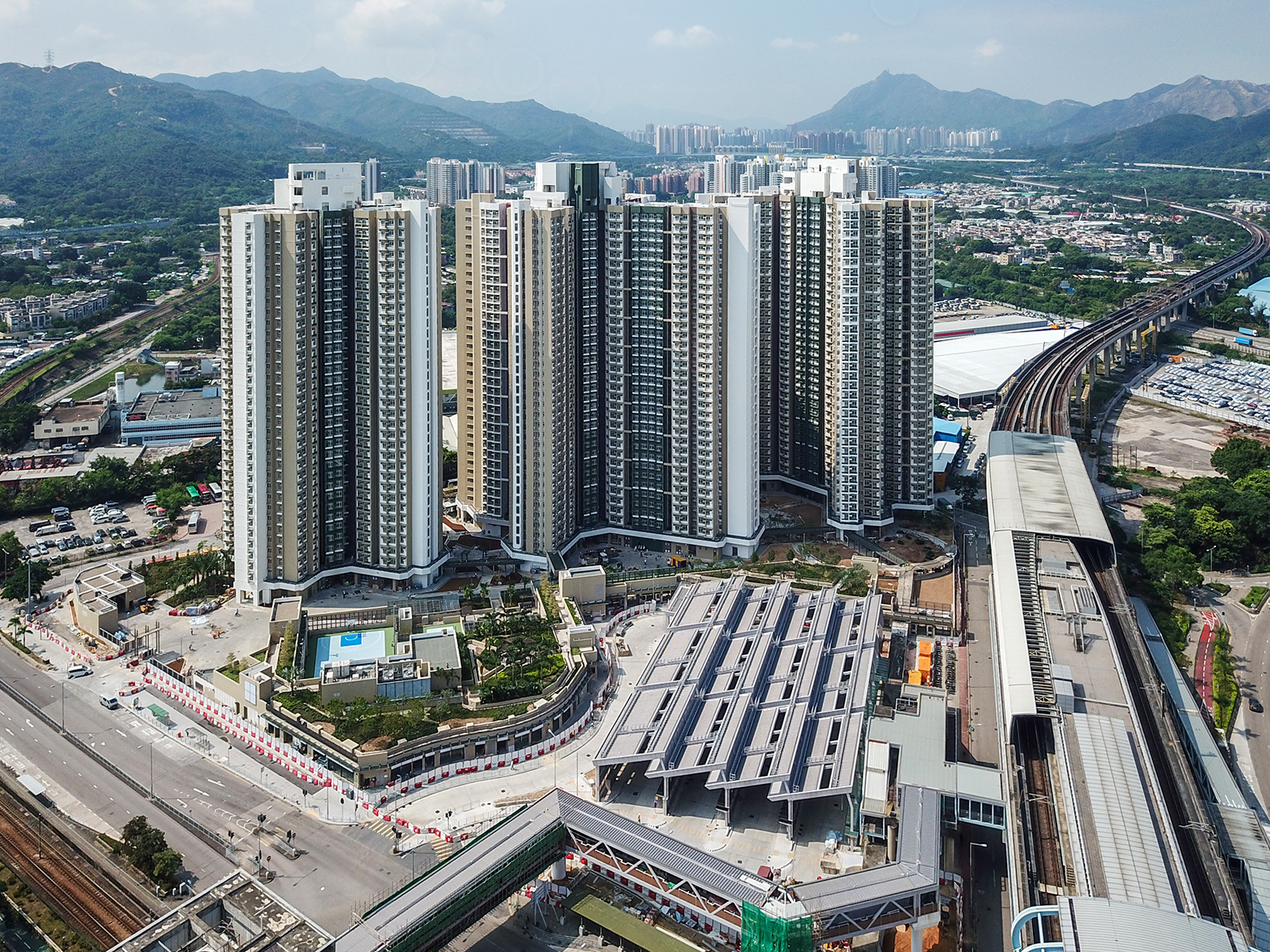 Ping Yan Court site view